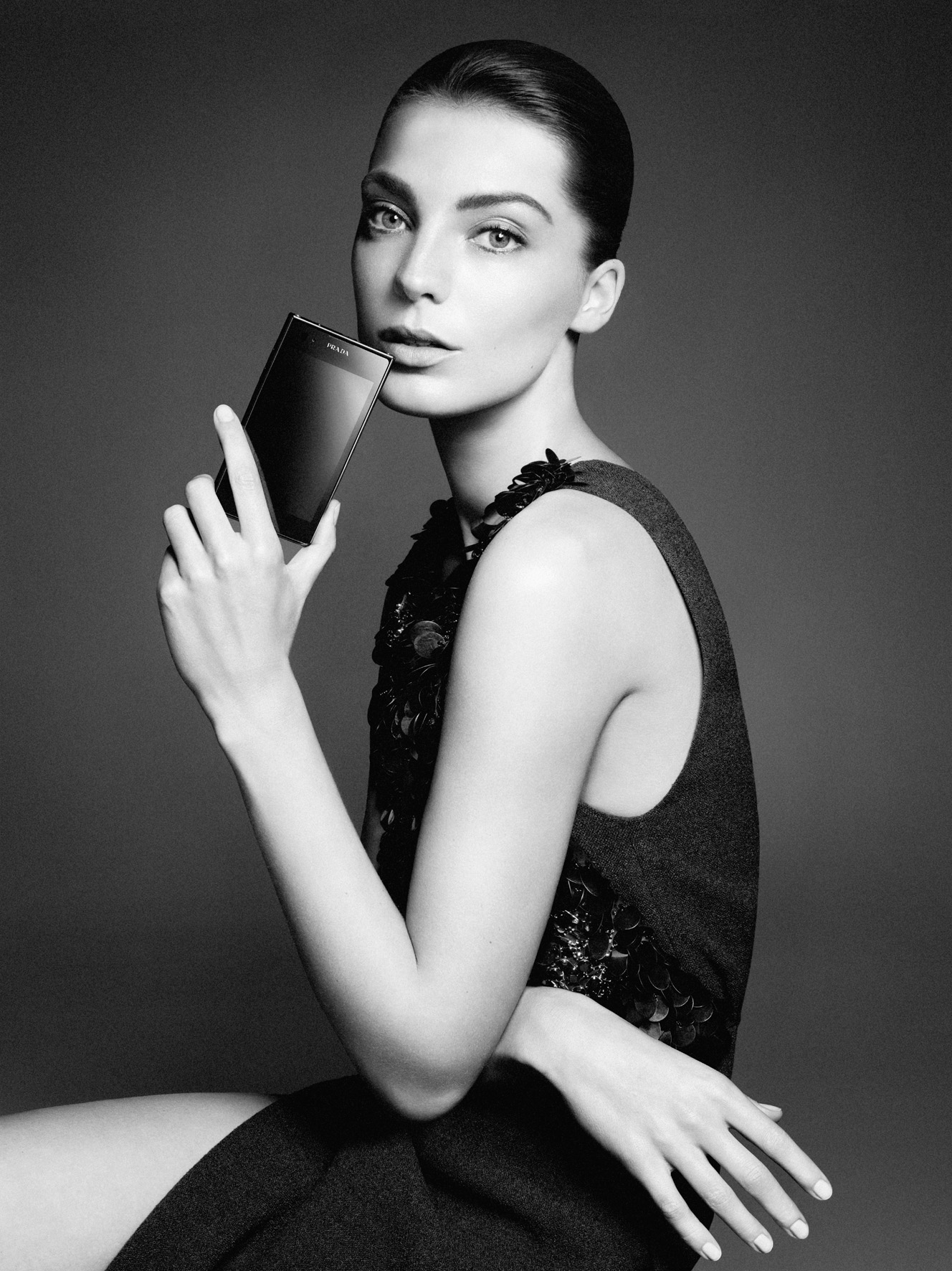 LG전자와 프라다가 ‘프라다폰3.0’의 글로벌 광고 모델로 배우 ‘에드워드 노튼(Edward Norton)’과 톱모델 ‘다리아 워보이(Daria Werbowy)’를 영입했다고 31일 밝혔다. 사진] 프라다폰3.0의 글로벌 광고 모델 배우 '에드워드 노튼'과 톱모델 '다리아 워보이' ※ LG전자 뉴스룸 에서 관련 보도자료를 확인실 수 있습니다.